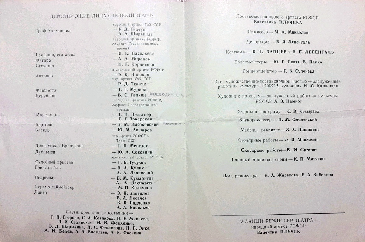 Программка спектакля "Безумный день или женитьба Фигаро". 70-е годы.